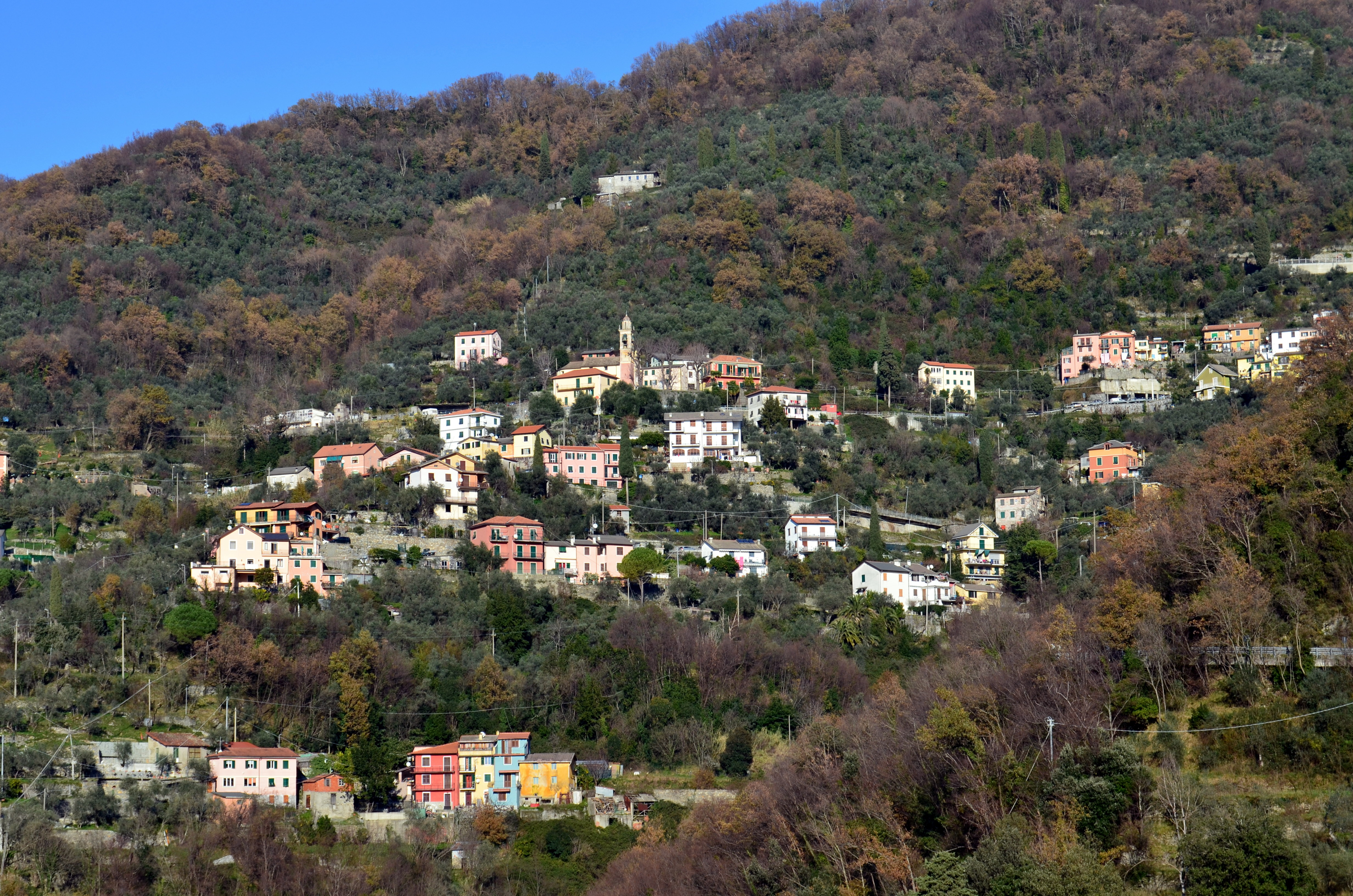 Salto, Avegno, Liguria, Italia